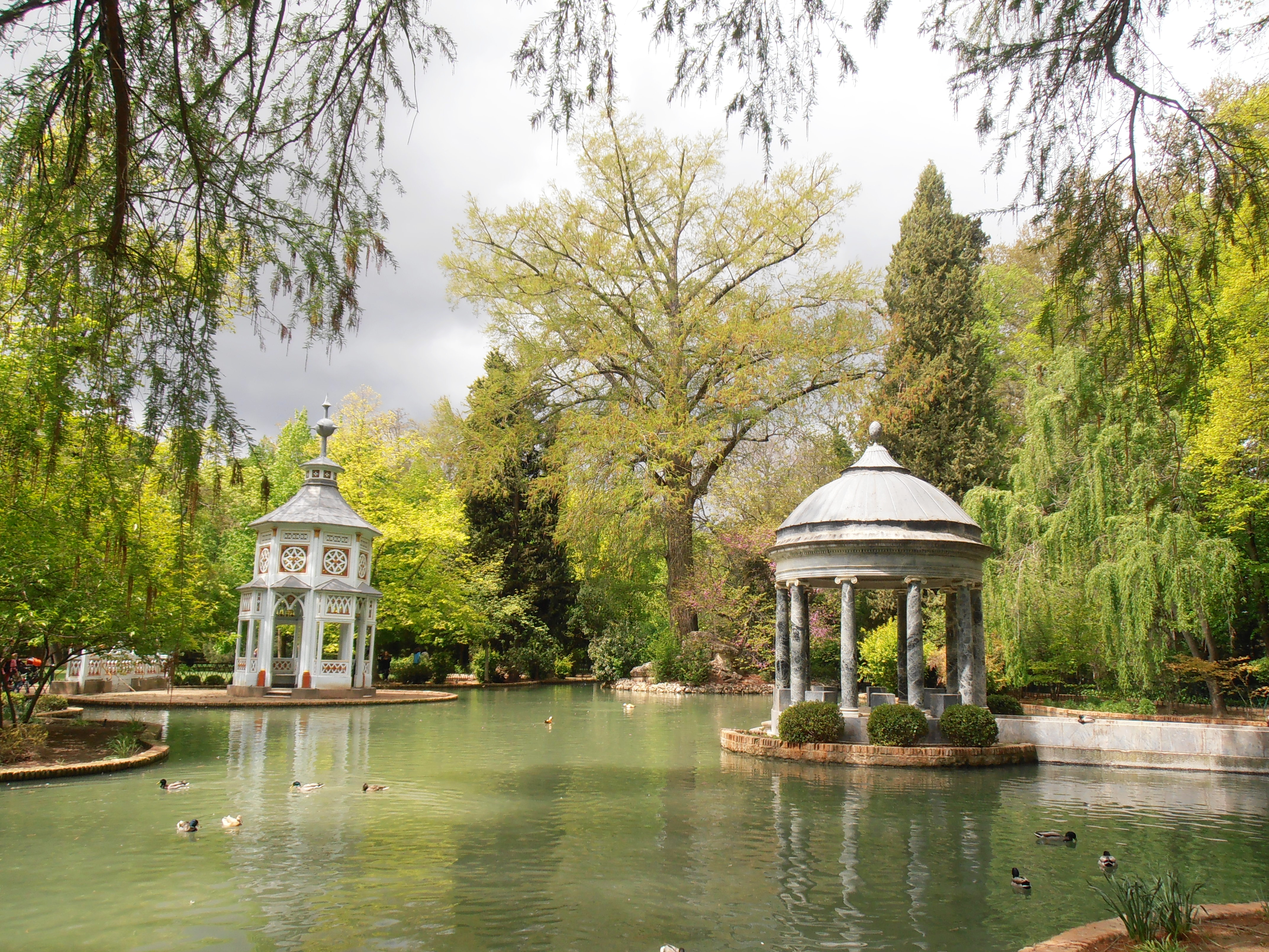 Chinescos